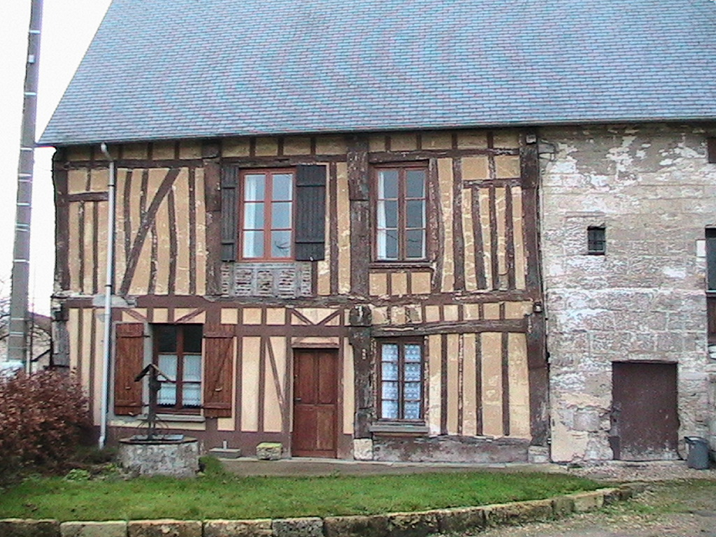 Description: Ler manoir de Jumièges à Norville (Seine-Maritime) Source: Photo personnelle Date: Février 2007 Auteur: Alain BOUDIER Libre de droits (Mention crédit obligatoire)